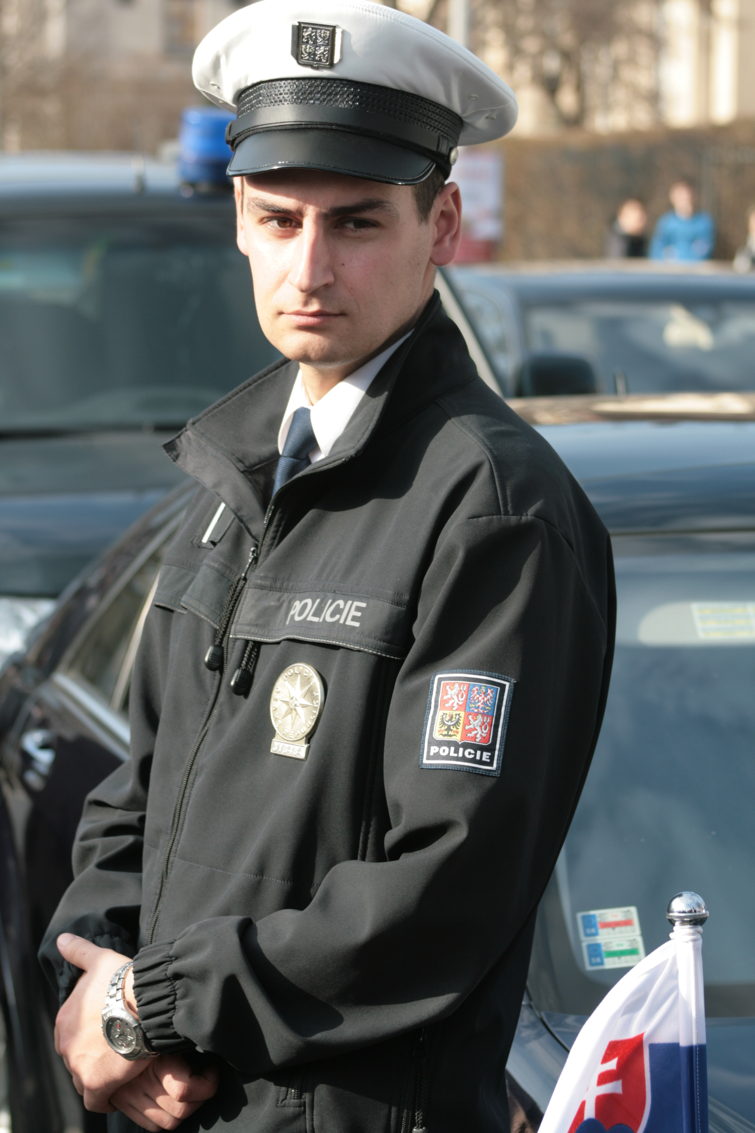 Dosluhující český prezident Václav Klaus a slovenský prezident Ivan Gašparovič se ve středu 6. března 2013 setkali ve vile Tugendhat v Brně, aby si vzájemně předali státní vyznamenání - Řád bílého lva 1. třídy a Řád bílého dvojkříže 1. třídy. ČTK: Prezidenti ČR a Slovenska si předali nejvyšší státní vyznamenání CTK: Czech and Slovak presidents present each other with state decorations